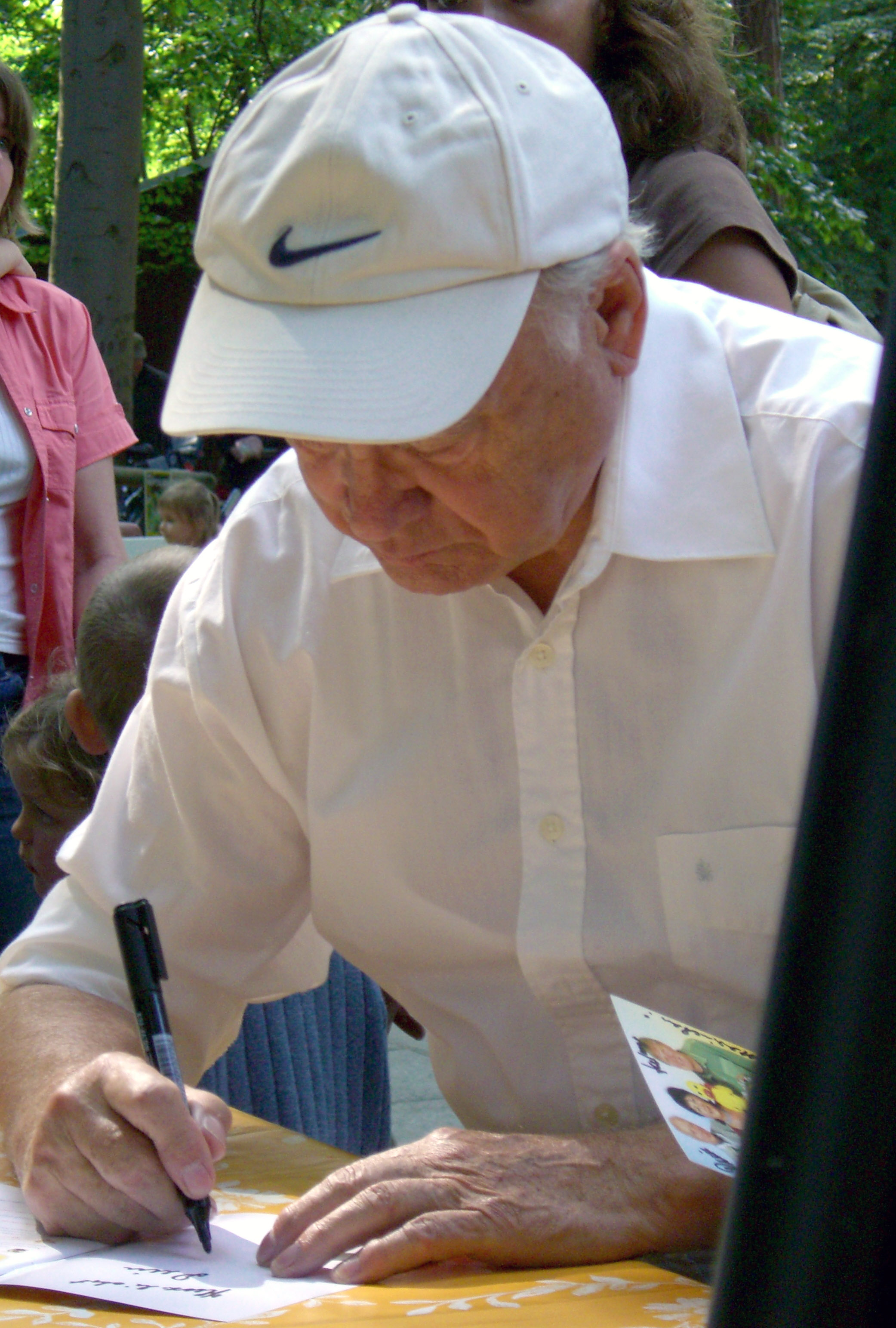 Nach der Vorstellung in Koserow gibt Heinz Schröder Autogramme als Pittiplatsch: "Herzlichst Dein Pitti"